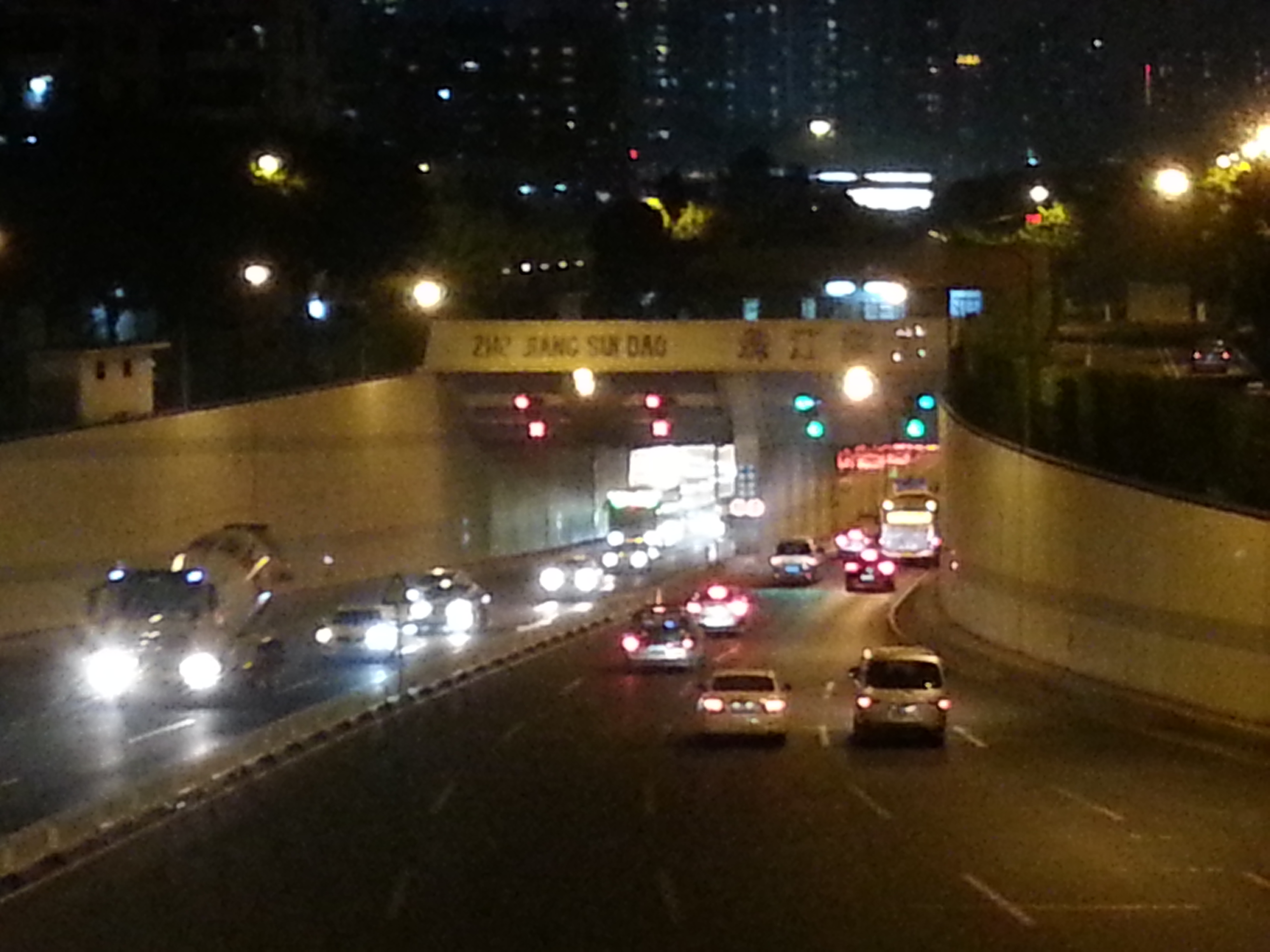 廣州珠江隧道芳村出入口